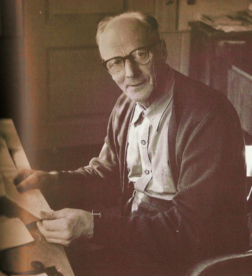 Peder J. Arnstad (1903–1979), gårdbruker og politiker (Sp).